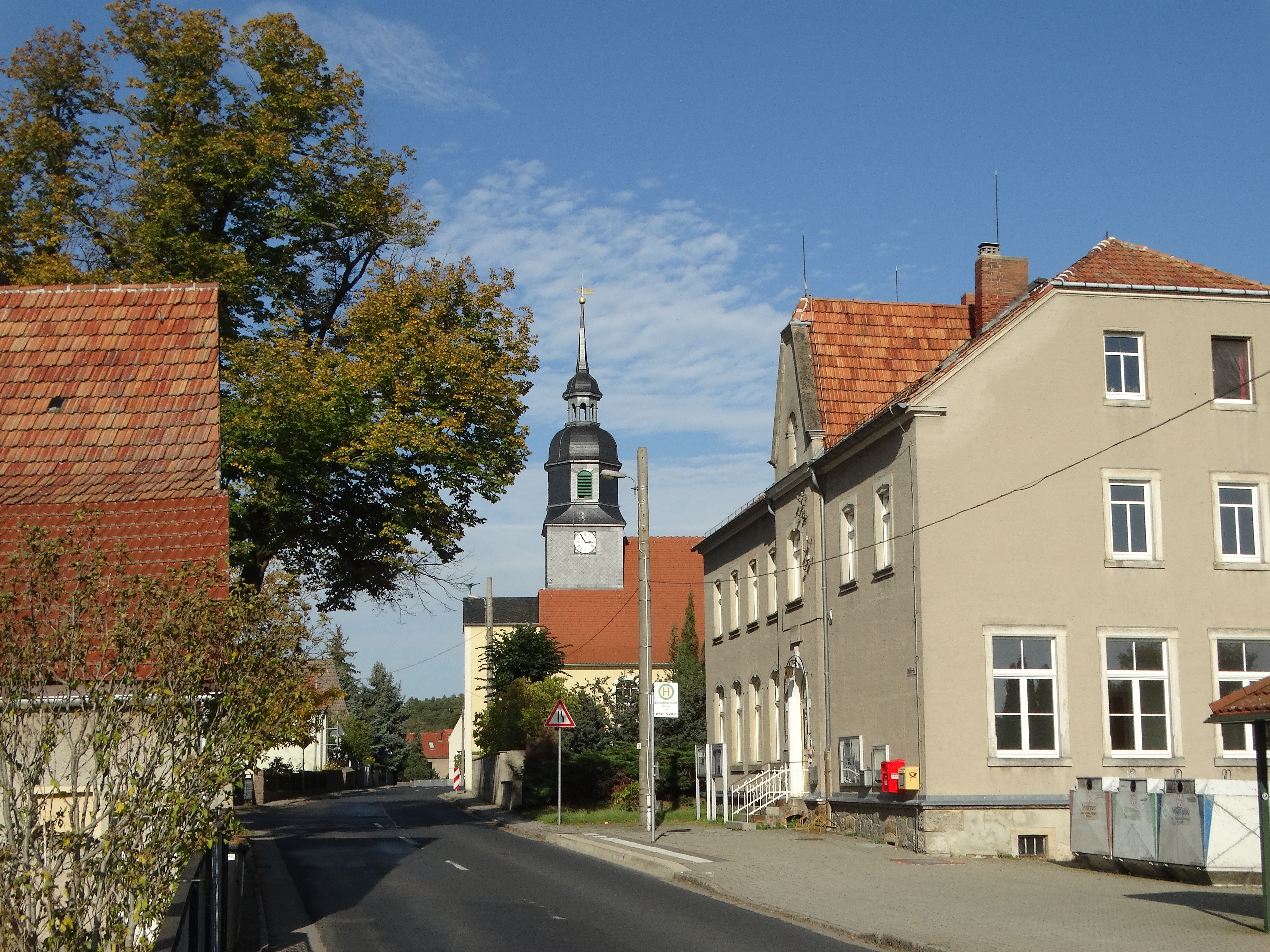 Das Ortszentrum mit Kirche und Gemeindeverwaltung (Gebäude der ehemaligen Schule) auf der Hauptstraße in Großdittmannsdorf (Radeburg)